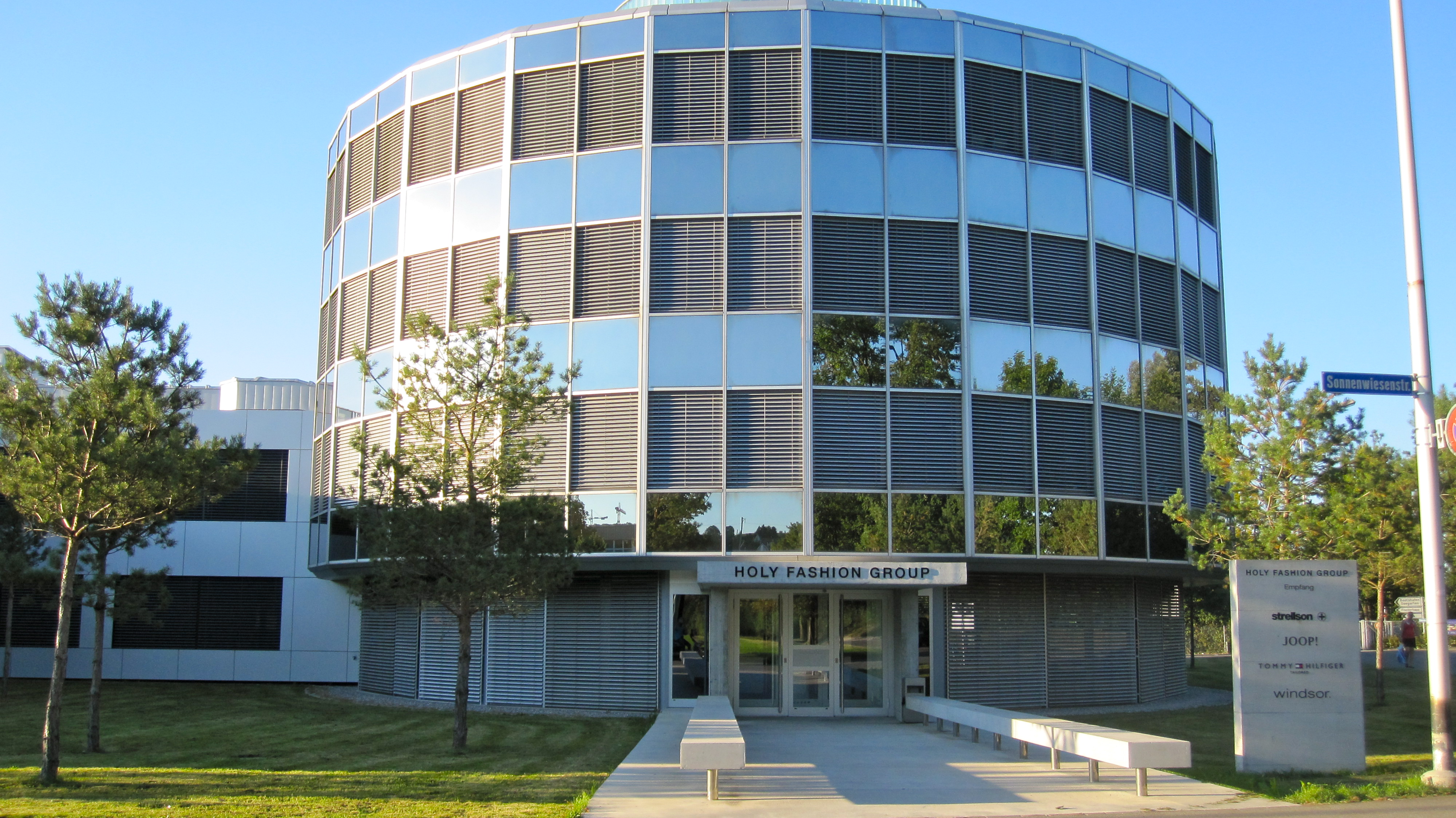 Gebäude der Holy Fashion Group in Kreuzlingen